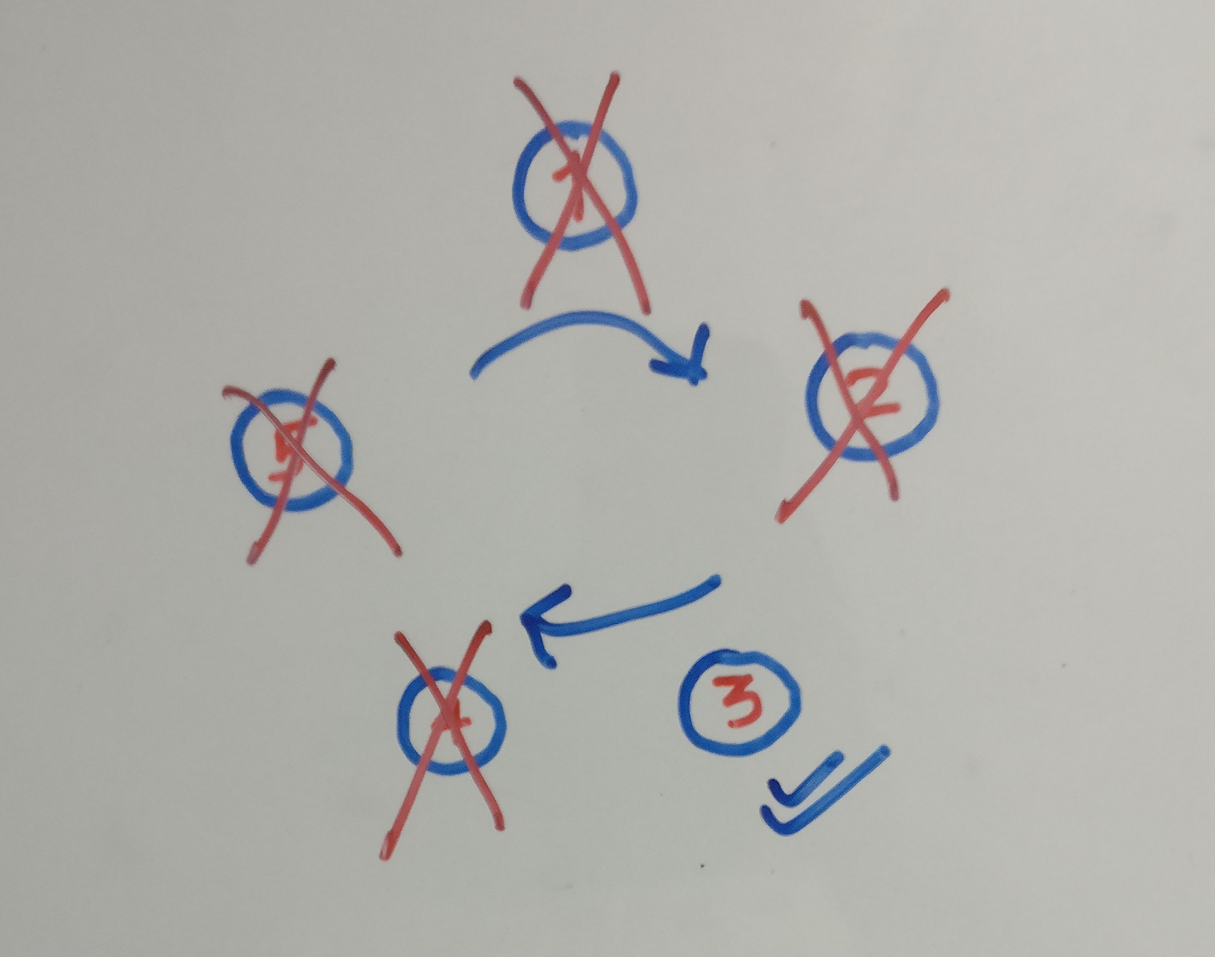 जोसेफस समस्या